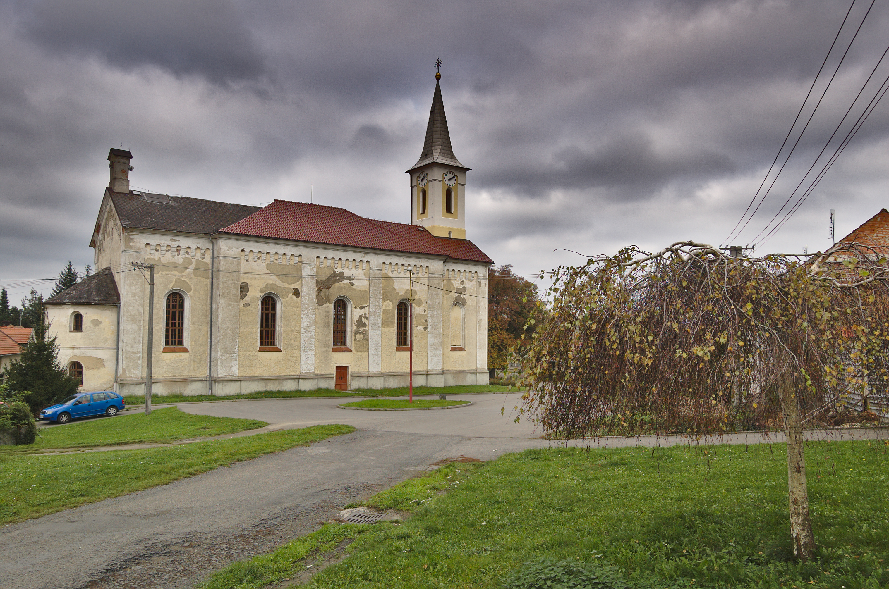 Kostel svatého Bartoloměje, Krumsín, okres Prostějov